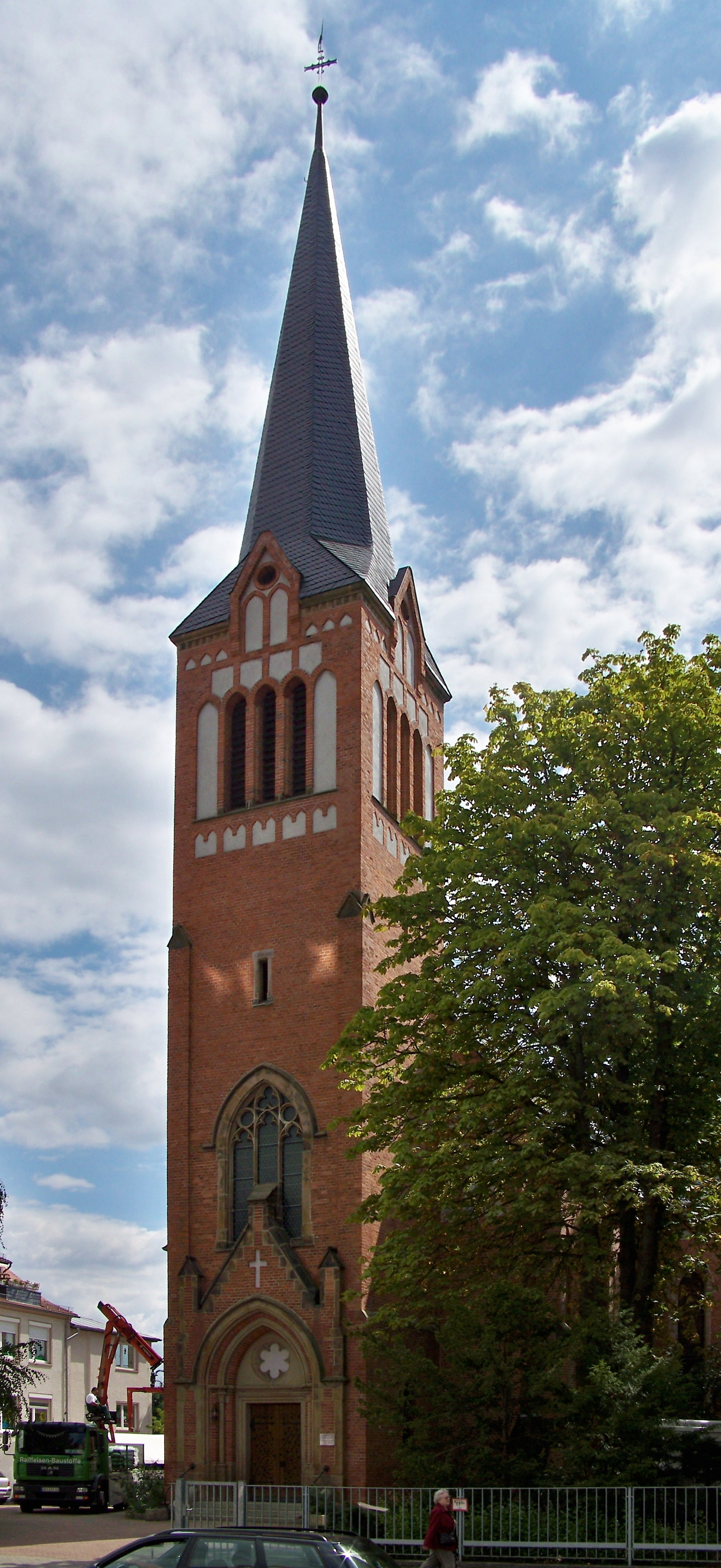 Katholische Kirche in Schönebeck (Elbe)